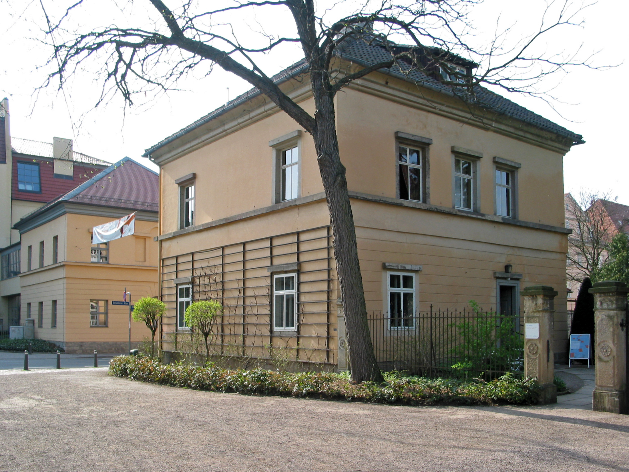 Das ehemalige Wohnhaus von Franz Liszt in Weimar (Südostansicht).